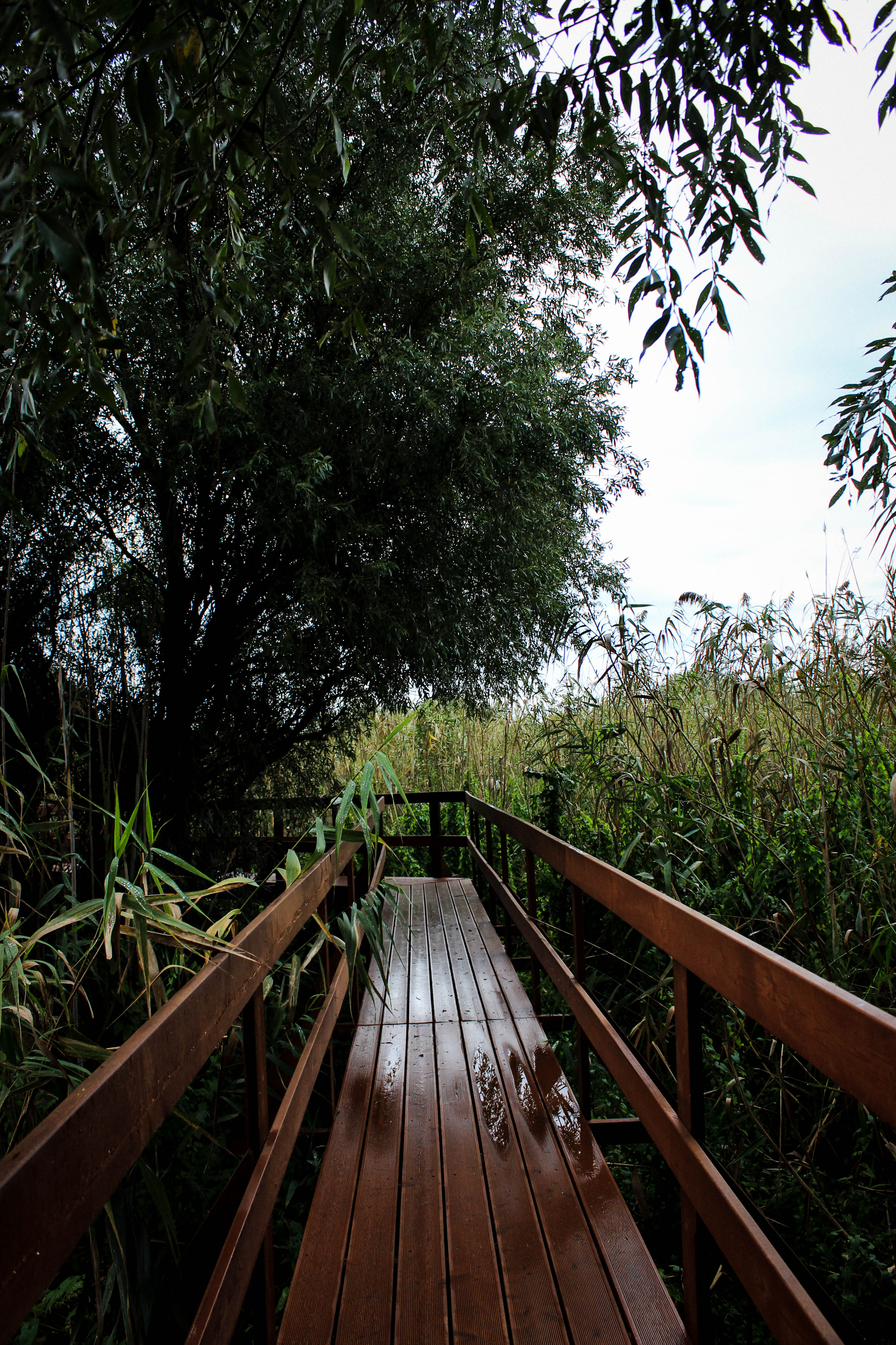 Астраханский заповедник: Заповедник расположен в южной части Астраханской области, в дельте реки Волги. Заповедник расположен на территории трех административных районов области: Володарского, Икрянинского и Камызякского, представляет собой три обособленных участка, расположенных в разных частях дельты Волги, Володарский район, Астраханская область. На фотографии Экологическая тропа на Дамчикском участке в западной части дельты. В апреле 2016 года на Дамчикском участке Астраханского заповедника открылась новая экологическая тропа оборудованная специальным деревянным настилом. Маршрут проходит через 4 острова, каждый из которых позволяет познакомиться с различными заповедными биотопами и их обитателями. This image is related to the protected area of Russia number 3000013